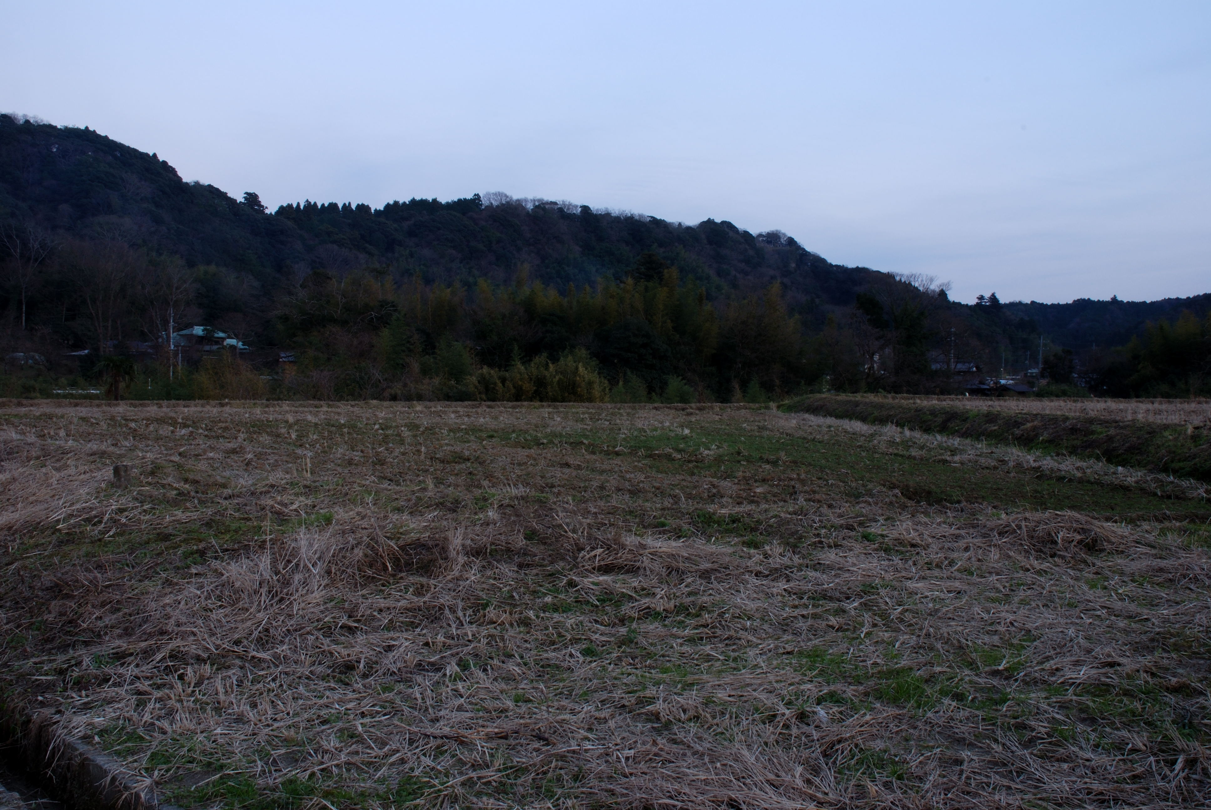 Kuruti Castle